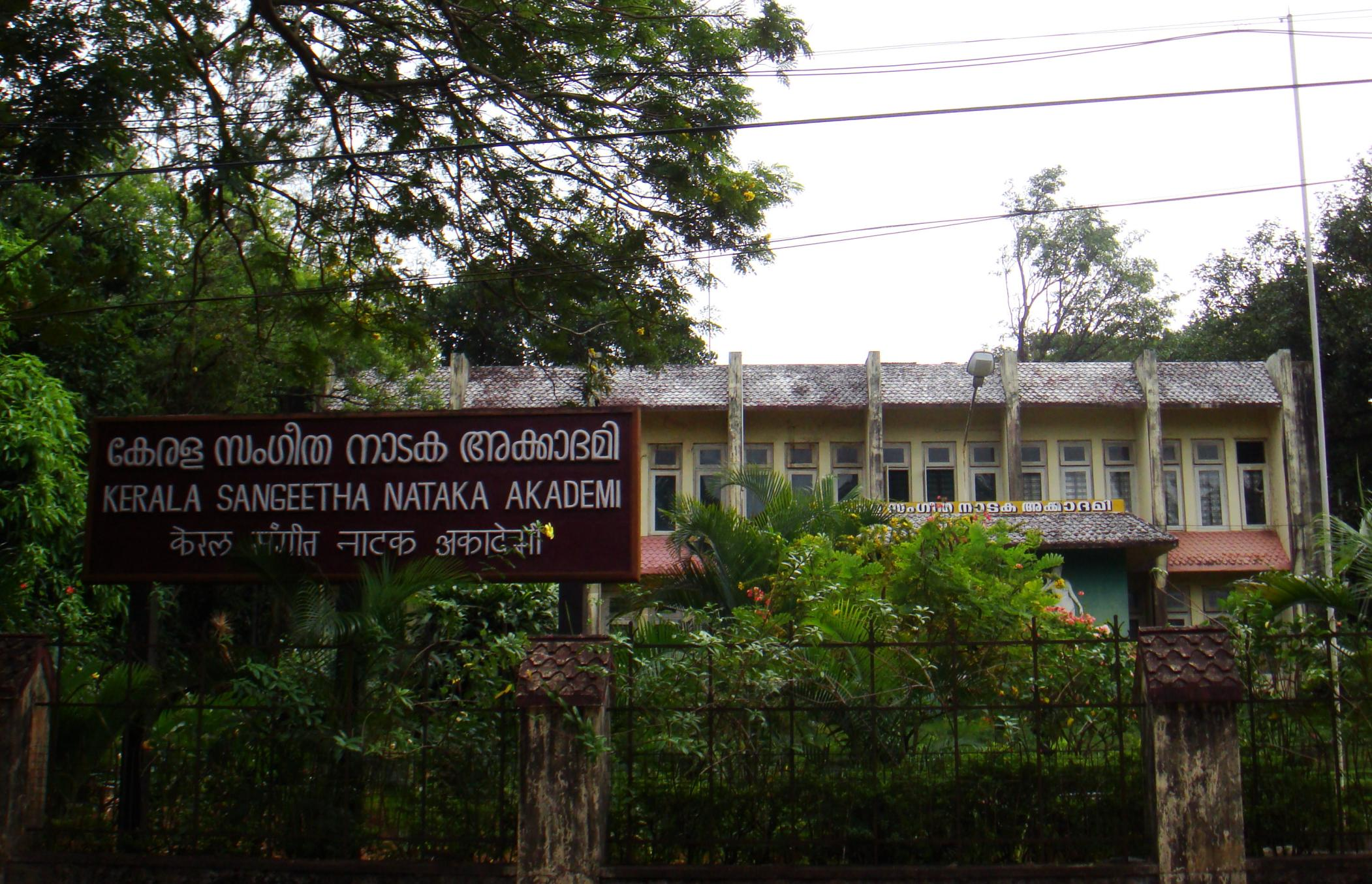 സംഗീതനാടക‍അക്കാദമി. തൃശൂർ